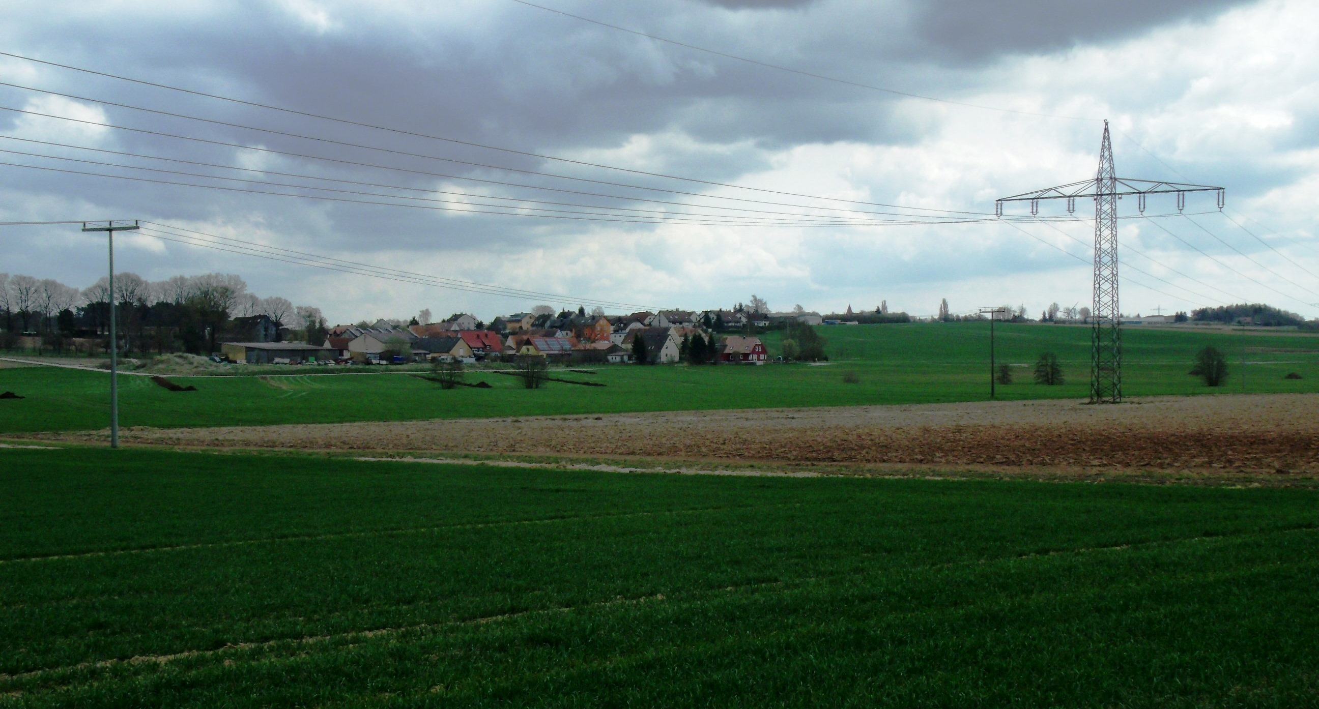 Wüstenbruck,Ortsteil von Ansbach